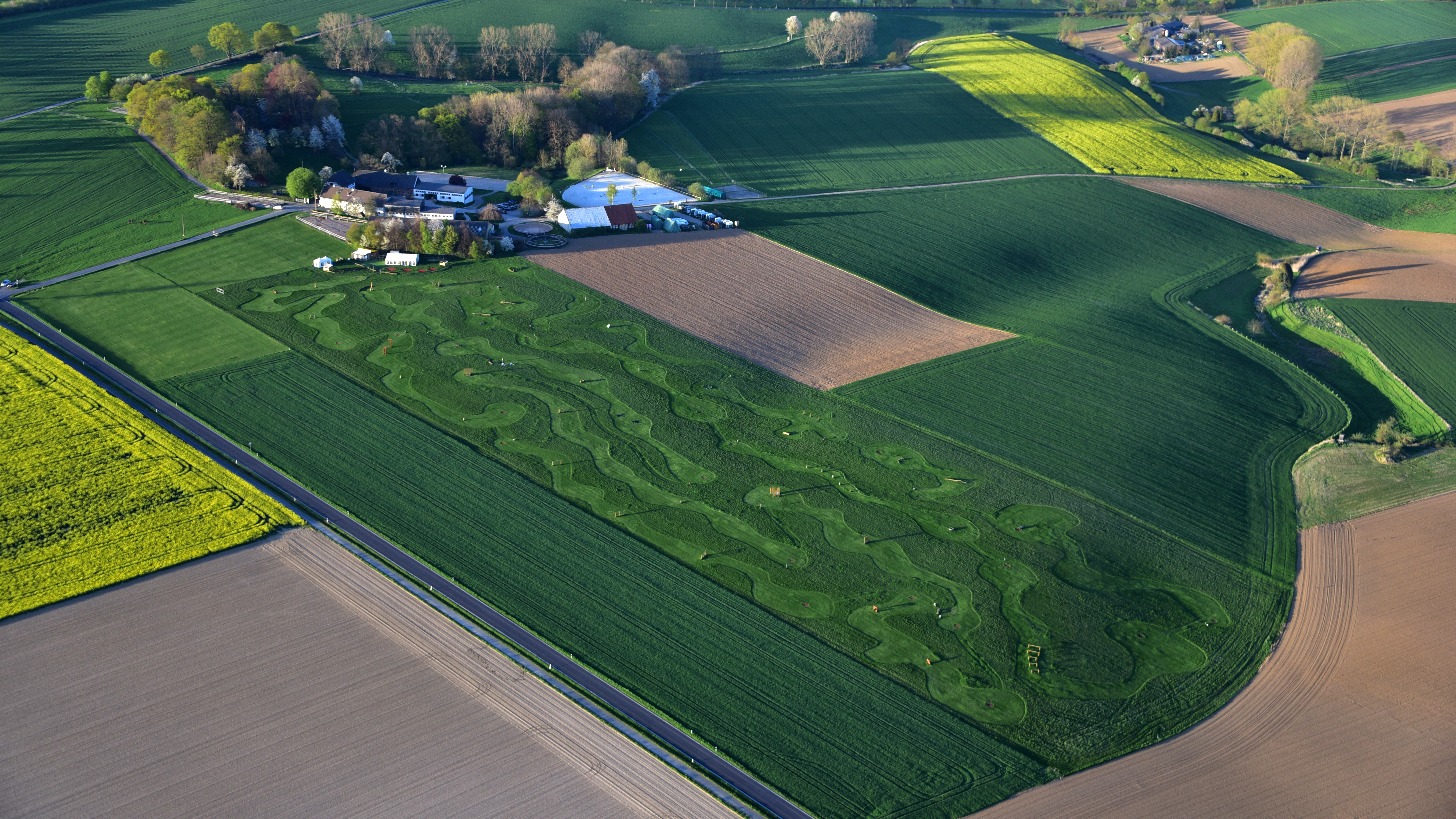 Heiderhof bei Bonn, Fußballgolf, Soccergolf